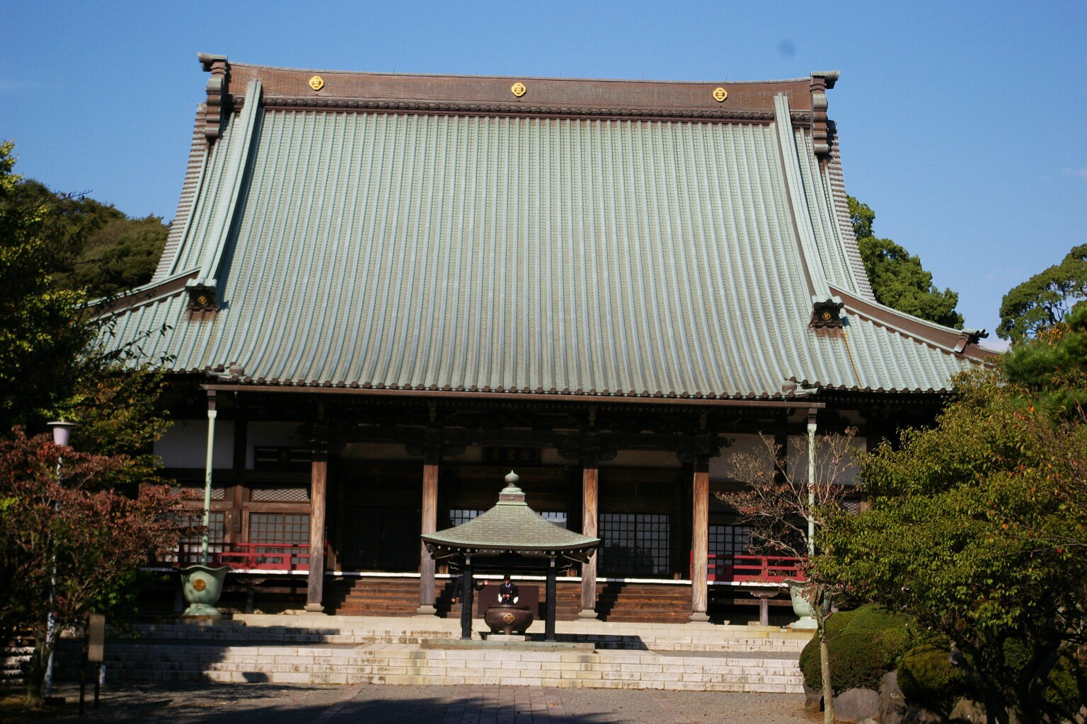 神奈川県藤沢市清浄光寺本堂。